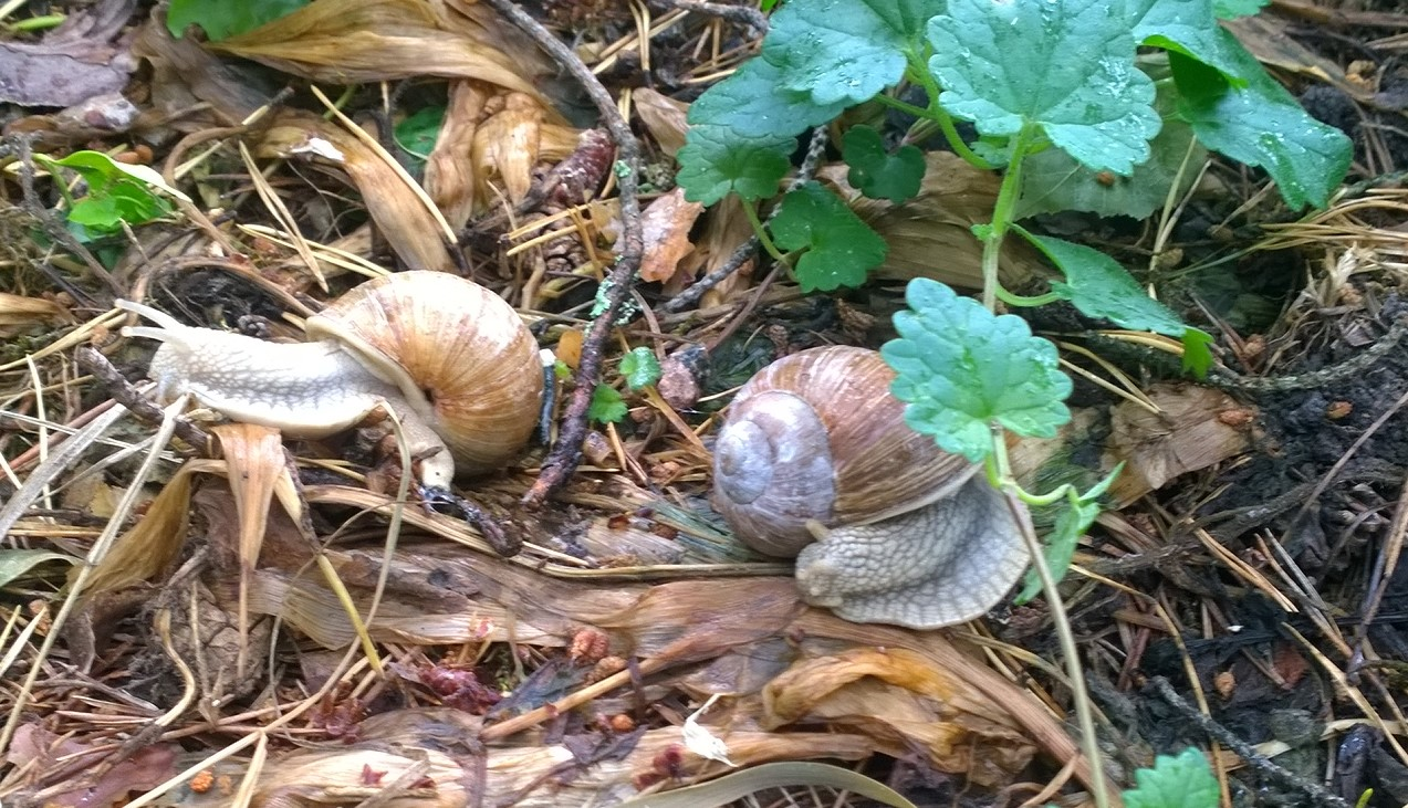 Viinimäkikotilot paritelleet juuri ja poistumassa omille teilleen. Anjala, kesäkuun puoliväli.